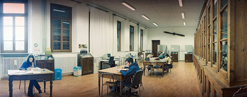 Sala "biblioteca studenti" del liceo classico Romagnosi di Parma